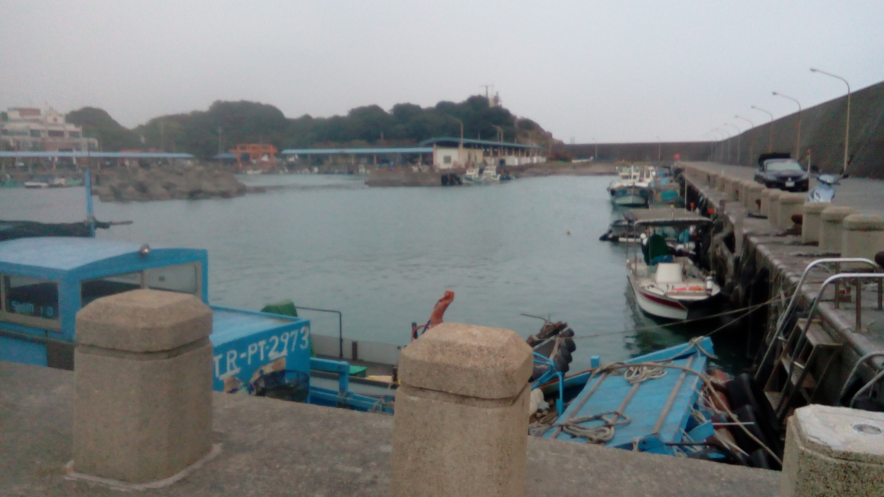 高雄市小港區鳳鳴里的鳳鼻頭港